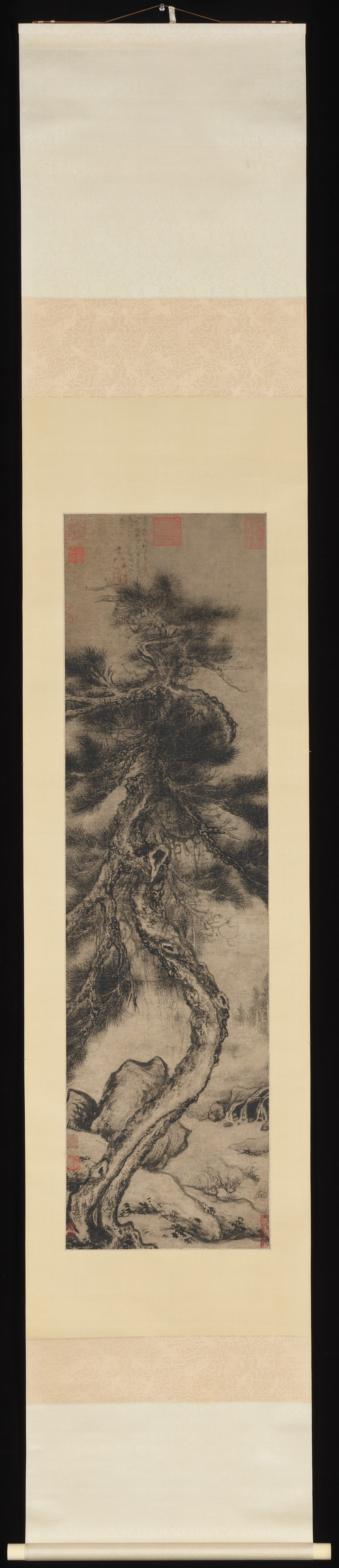 China; Hanging scroll; Paintings